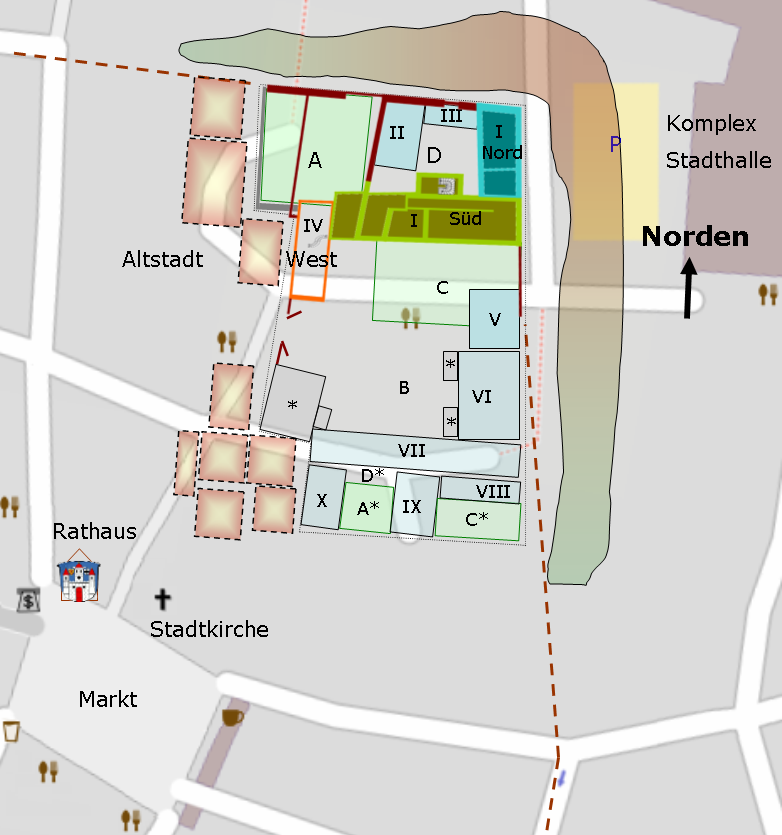 Schematisierte Lage und Größe des Darmstädter Schlosses in Groß-Umstadt zu unterschiedlichen Zeiten Lage: Nordostecke der Altstadt an der Stadtmauer (weiterer ehemaliger Verlauf gestrichelt dargestellt) Schwarz gepunkteter Umriss gibt die Größe um 1787 wieder (Gebäude (blau) und Gärten (grün) sind transparent hinterlegt.) Der farbige Grundriss (Nord-, West-, Südflügel) die Größe um 1940 Die ausgefüllten Flächen zeigen die noch heute (2011) stehenden Nord- und Südflügel Karte basiert auf OpenStreetMap